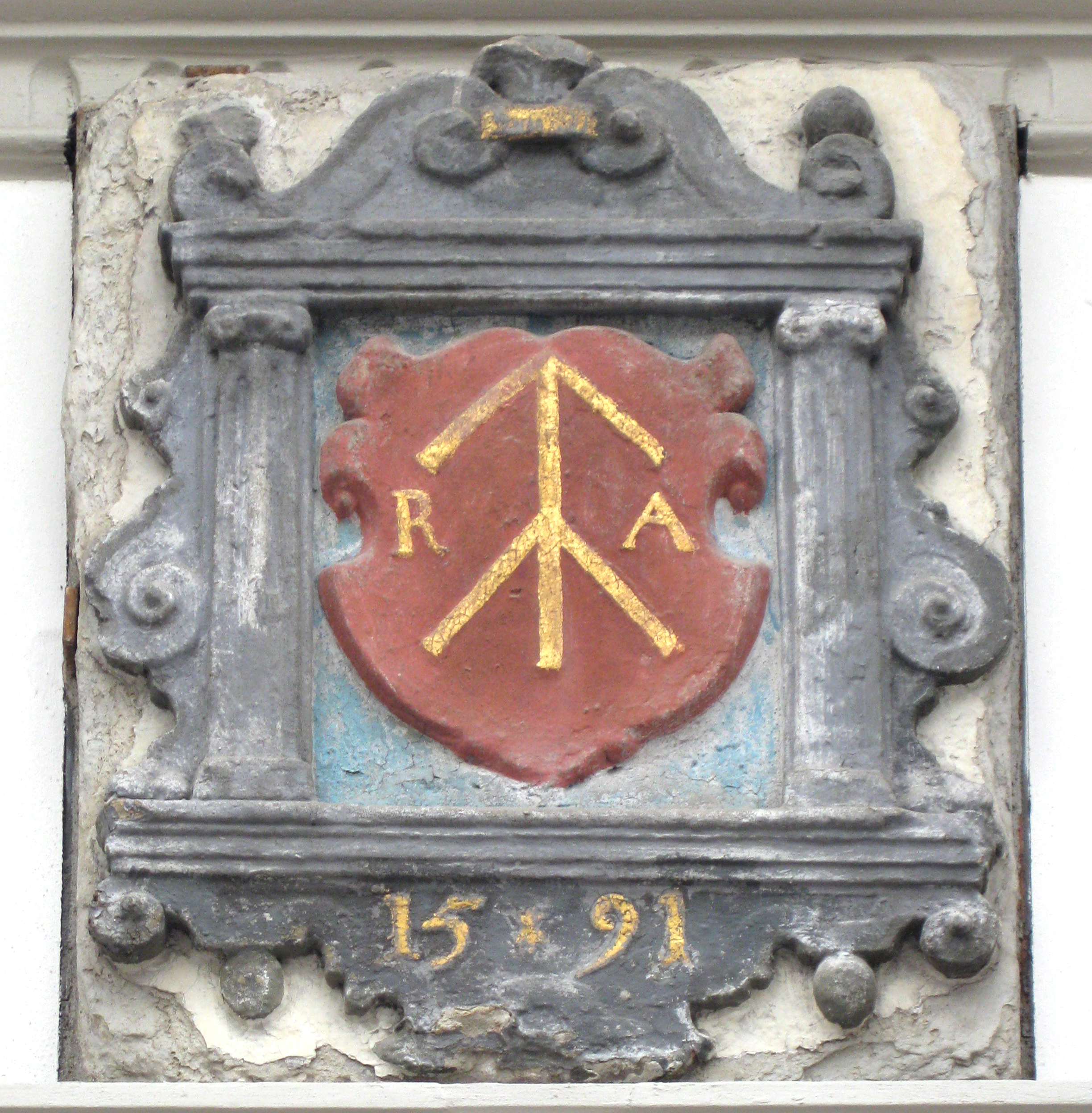 Hauszeichen mit Monogramm „R.A.“ aus dem Jahr 1591 im Renaissanceportal des Hauses Fleischhauerstraße 14 in Lübeck.